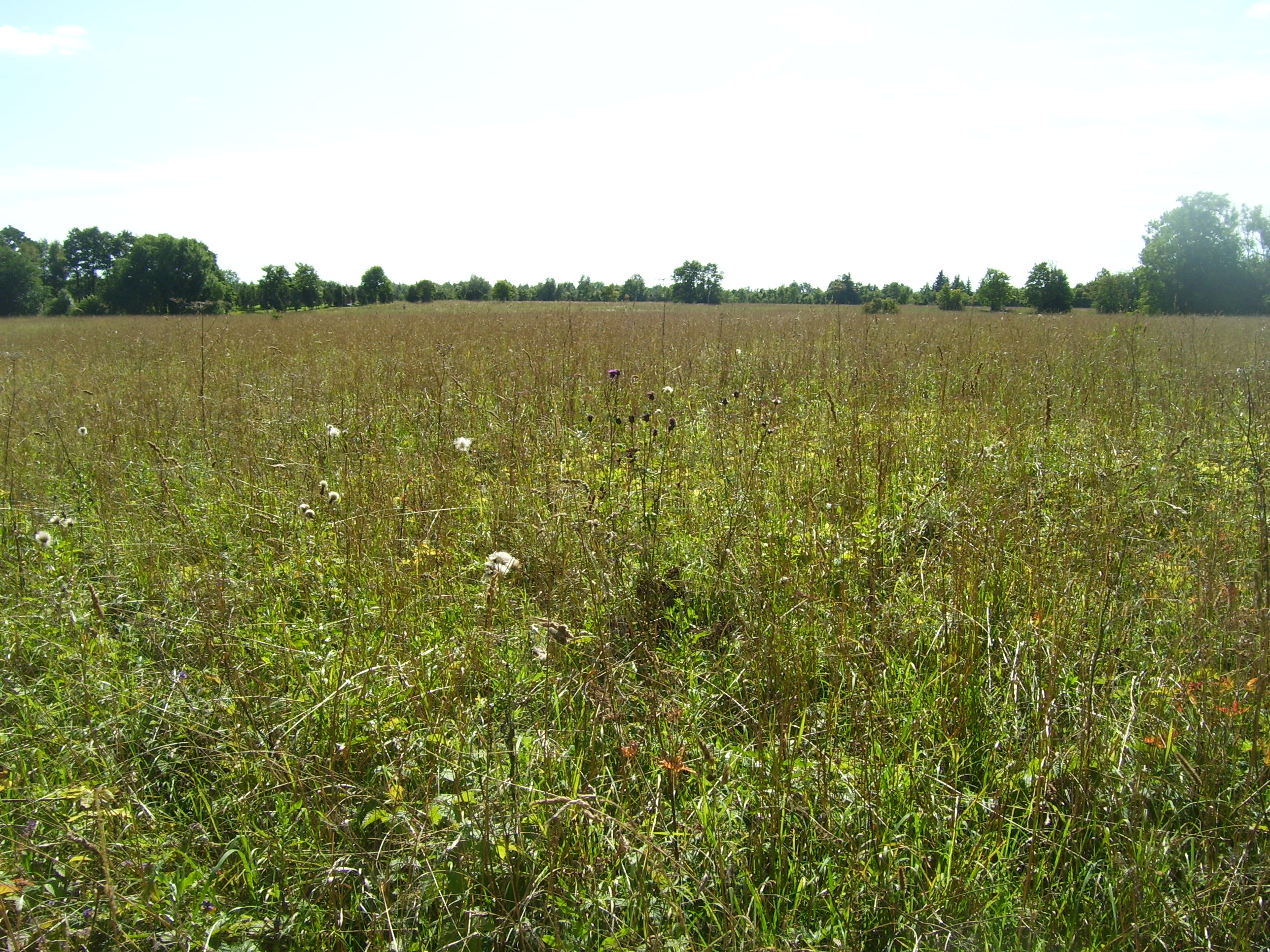 Tsitre klindisaar, vaade panga poolt lõuna (Soorinna) poole